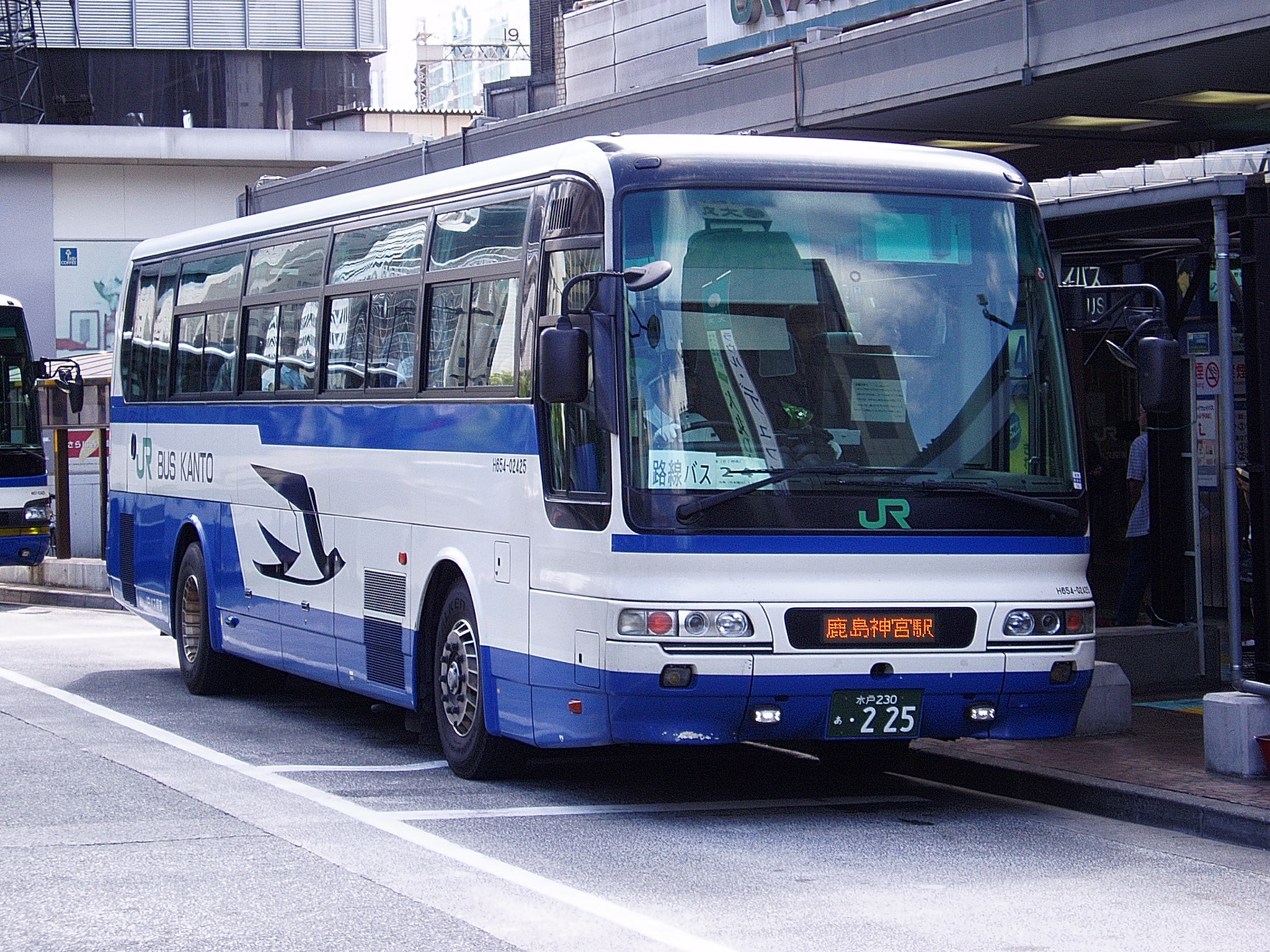 JR Bus Kanto H654-02425 "Kashima" Mitsubishi KL-MS86MP at Tokyo Sta.